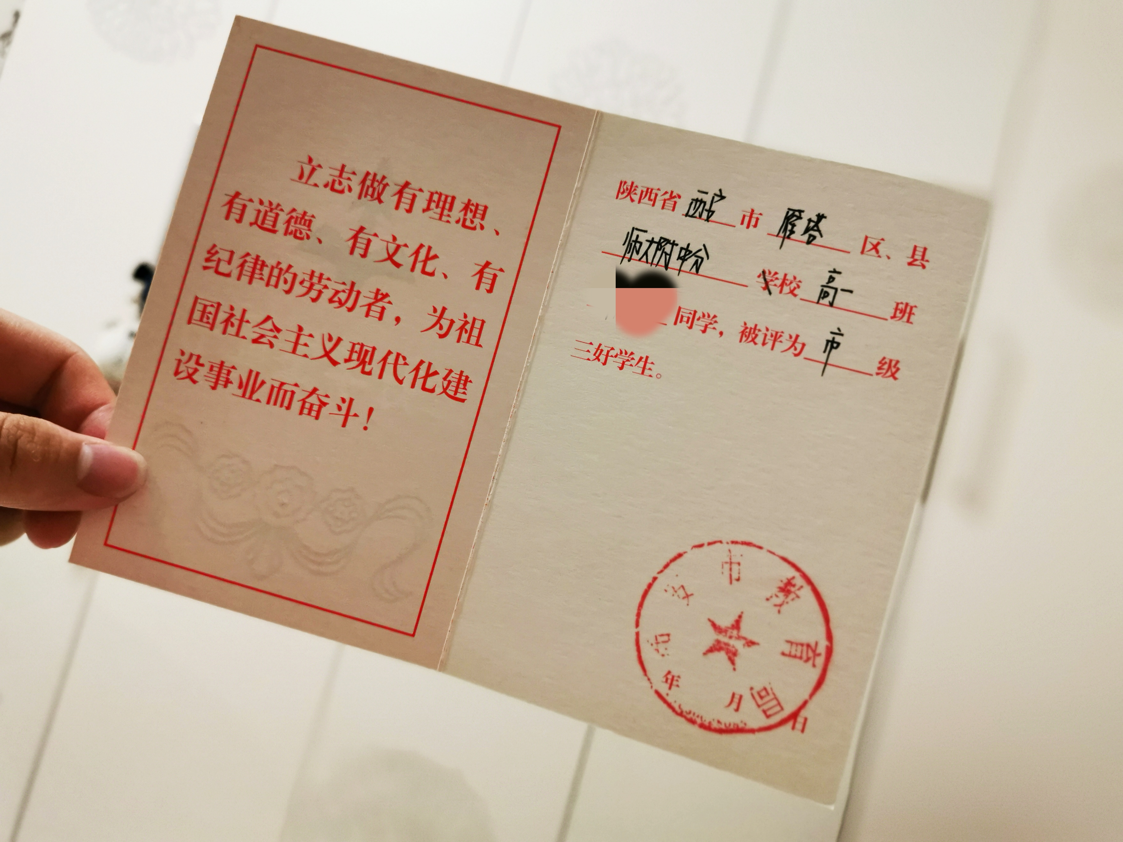 西安市教育局颁发的三好学生证